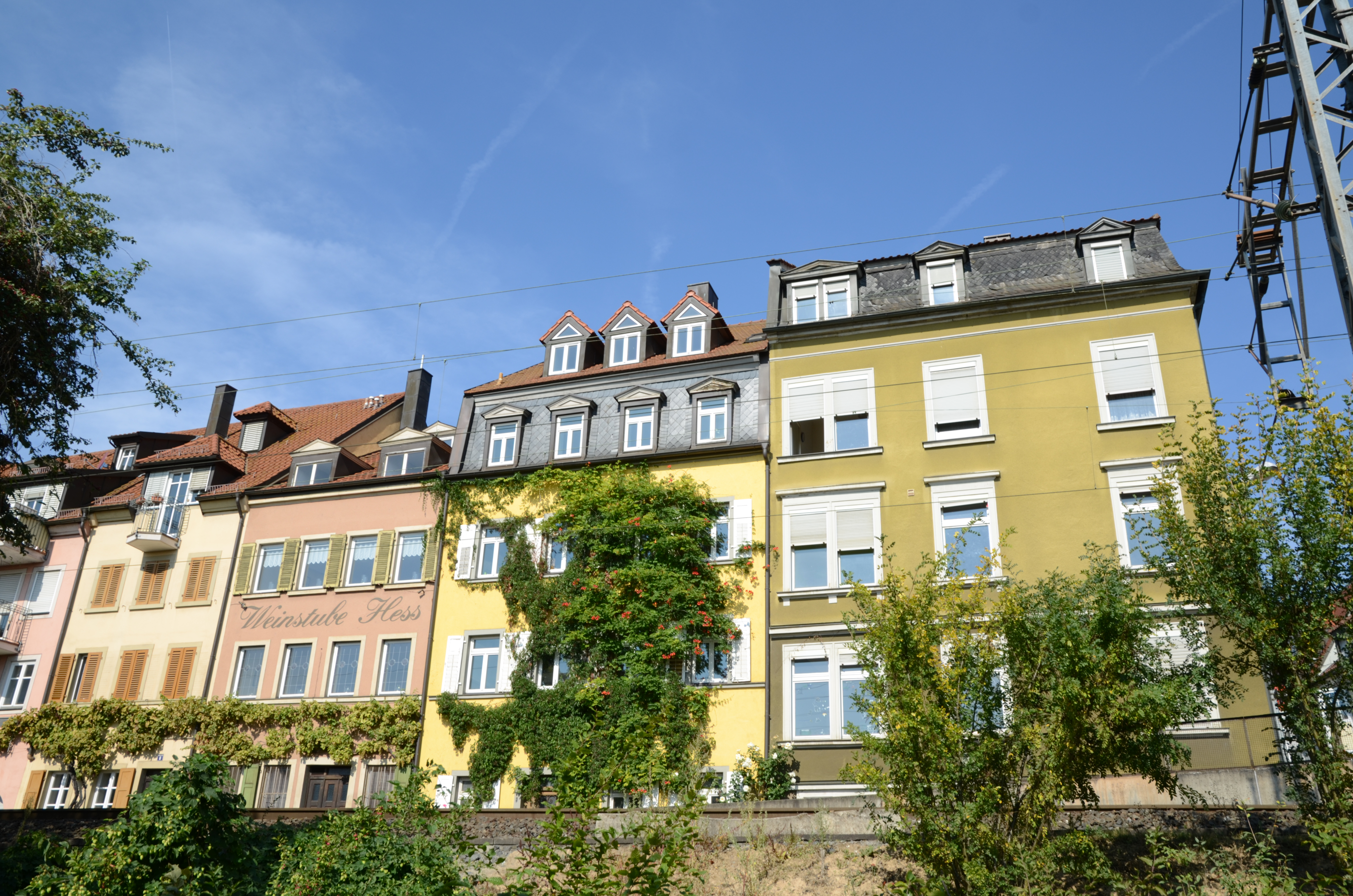 Schweinfurt Fischerrain 69, 67, 65 und 63